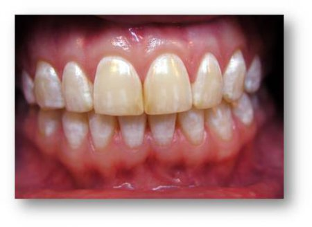 ատամների վրա նկատվում են հետքերի, բծերի տեսքով ախտահարումներ